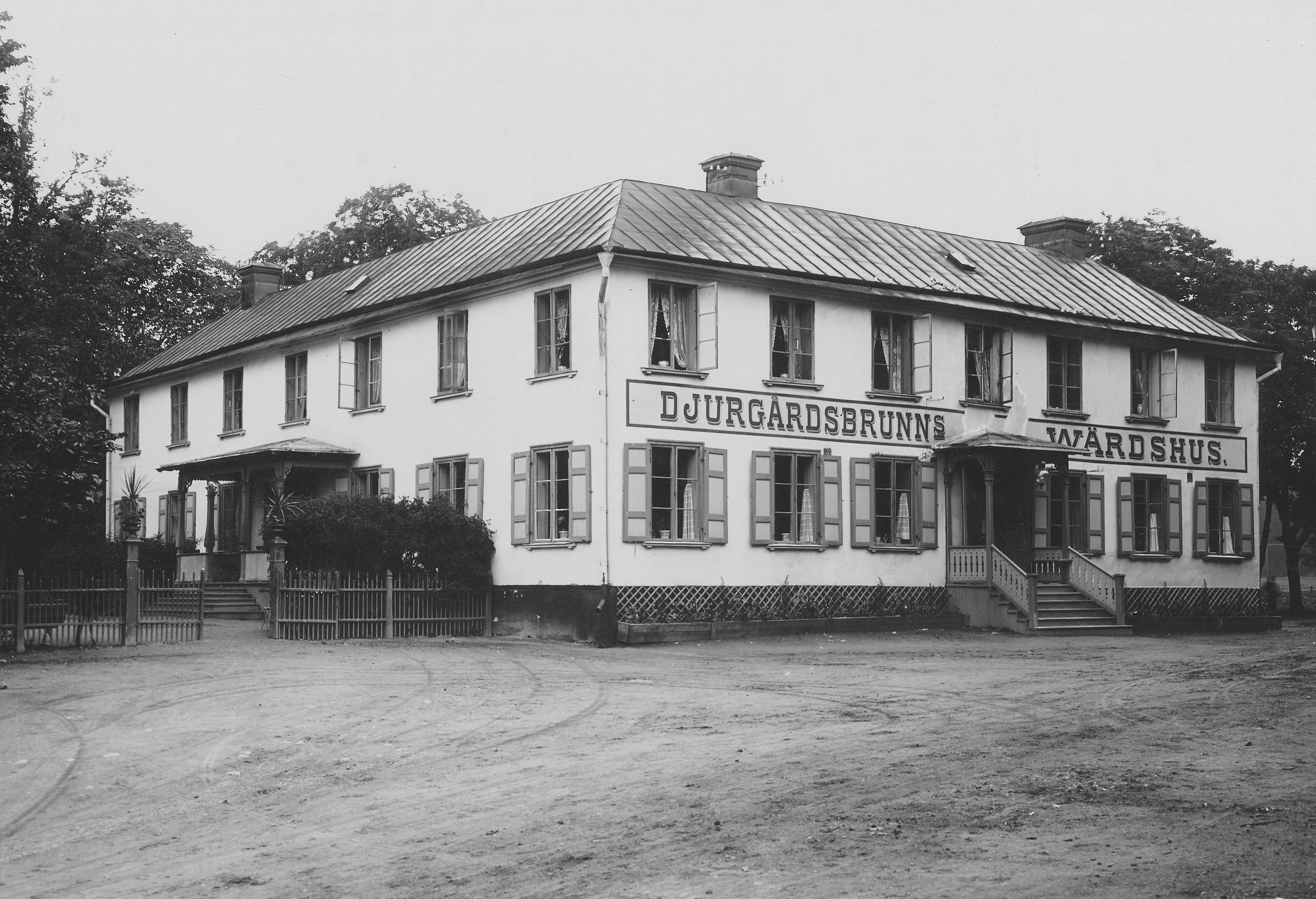 Djurgårdsbrunns Wärdshus Djurgårdsbrunn (Djurgårdens hälsobrunn). Djurgårdsbrunnsvägen 68. Gärdet. Ladugårdsgärdet.